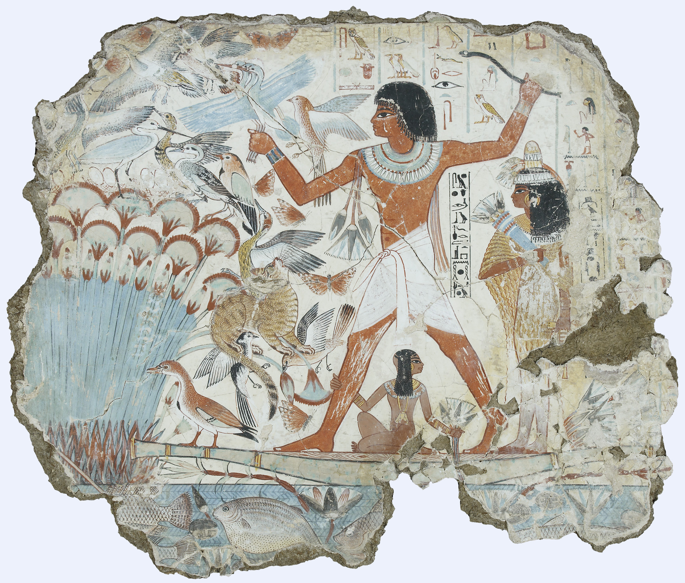 Jagd im Papyrusdickicht; Ausschnitt aus einer Wandmalerei im Grab des Nabamun in Theben-West, heute im British Museum, Tempera auf Putz, Höhe 81cm, 18. Dynastie, vor 1350 v. Chr.